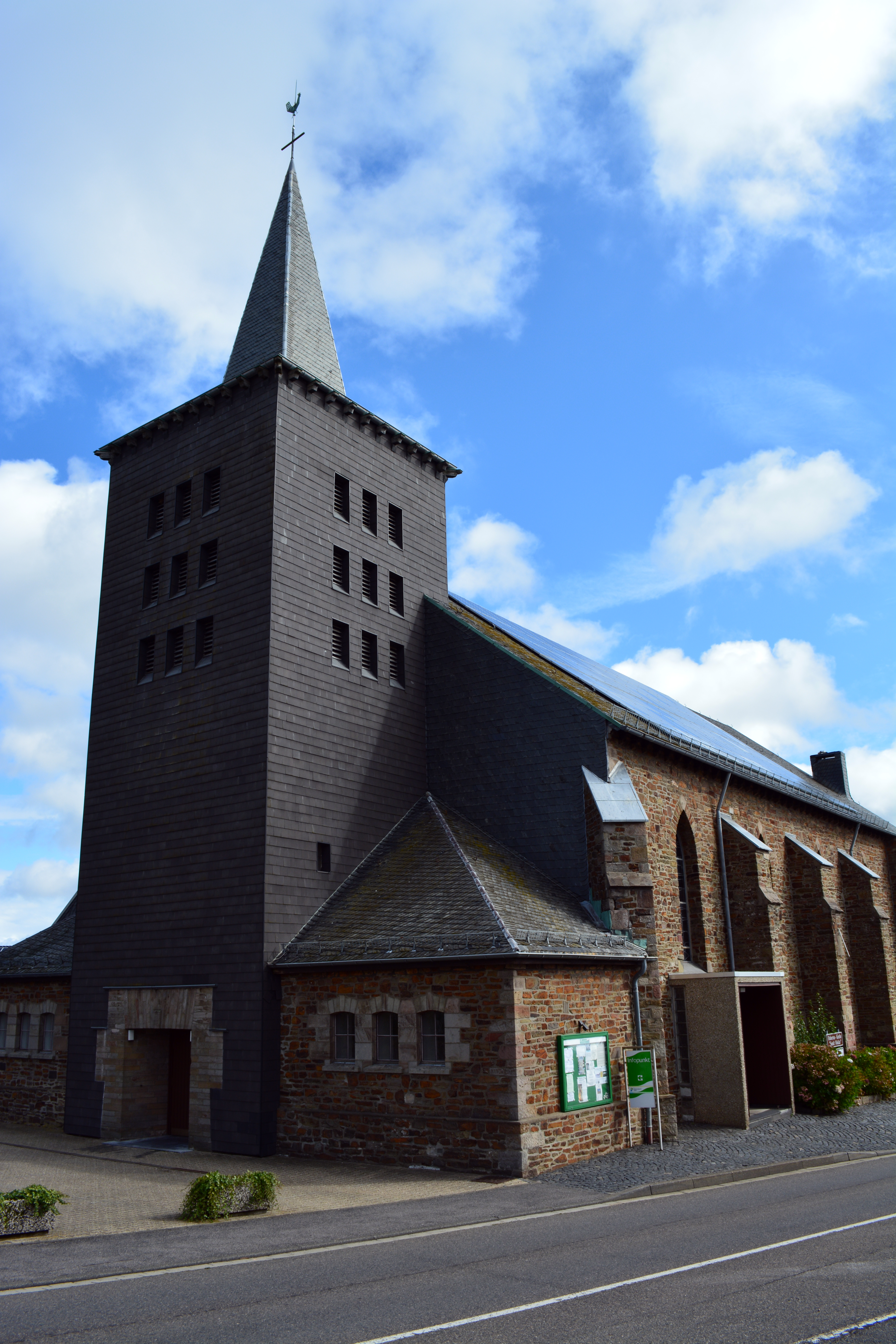 Kath. Pfarrkirche St. Hubertus, Nideggen - Schmidt